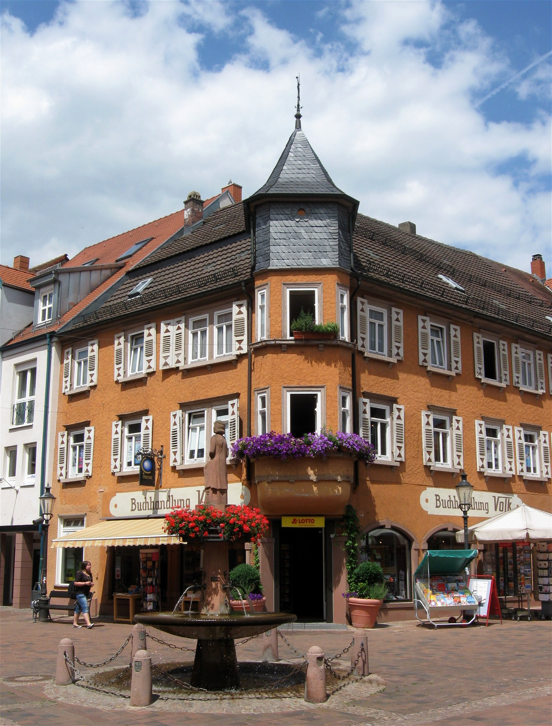 Haus am Marktplatz in Buchen (Odenwald), Baden-Württemberg.